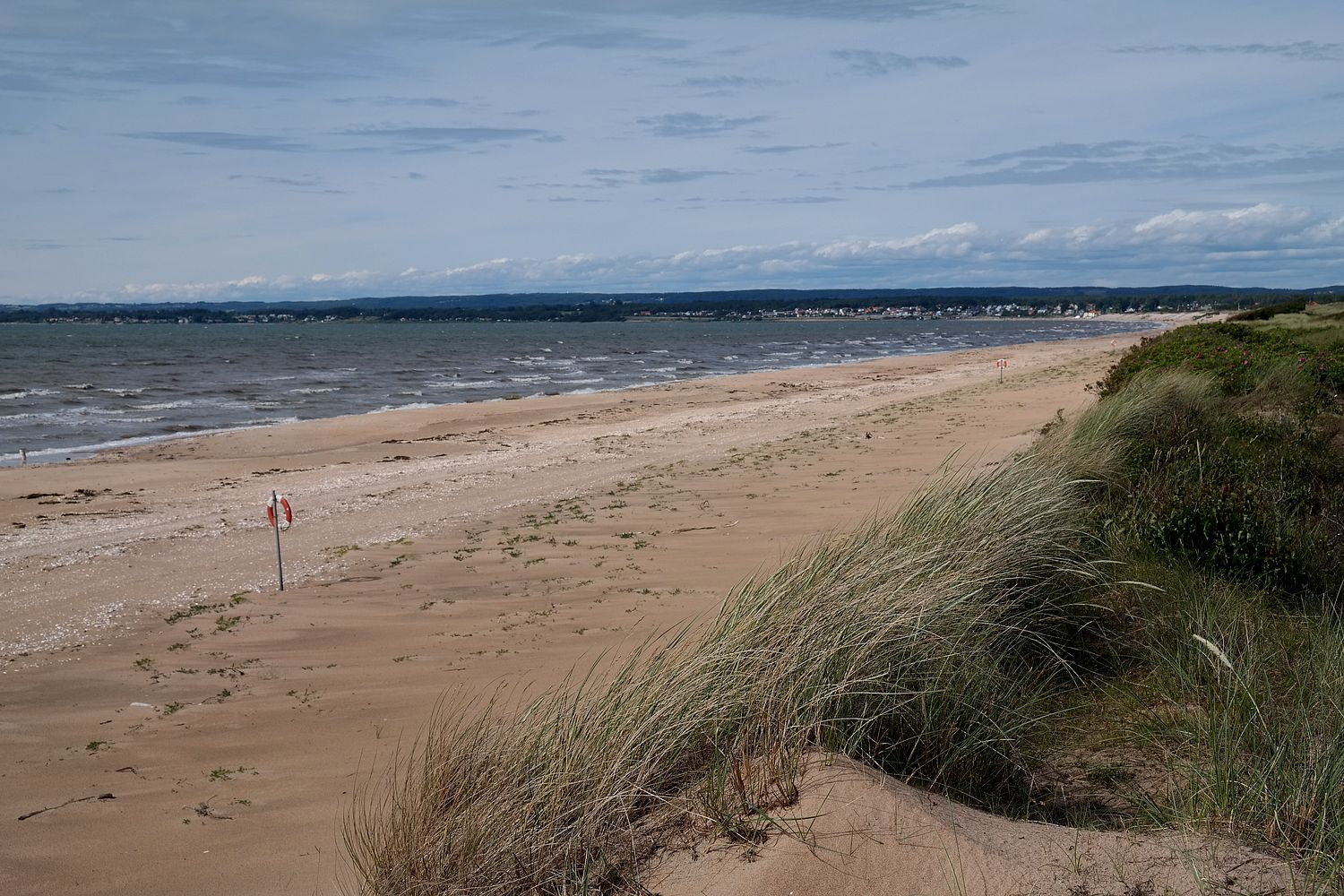 Strandabschnitt Sibirien in der Gemeinde Ängelholm, Schweden.